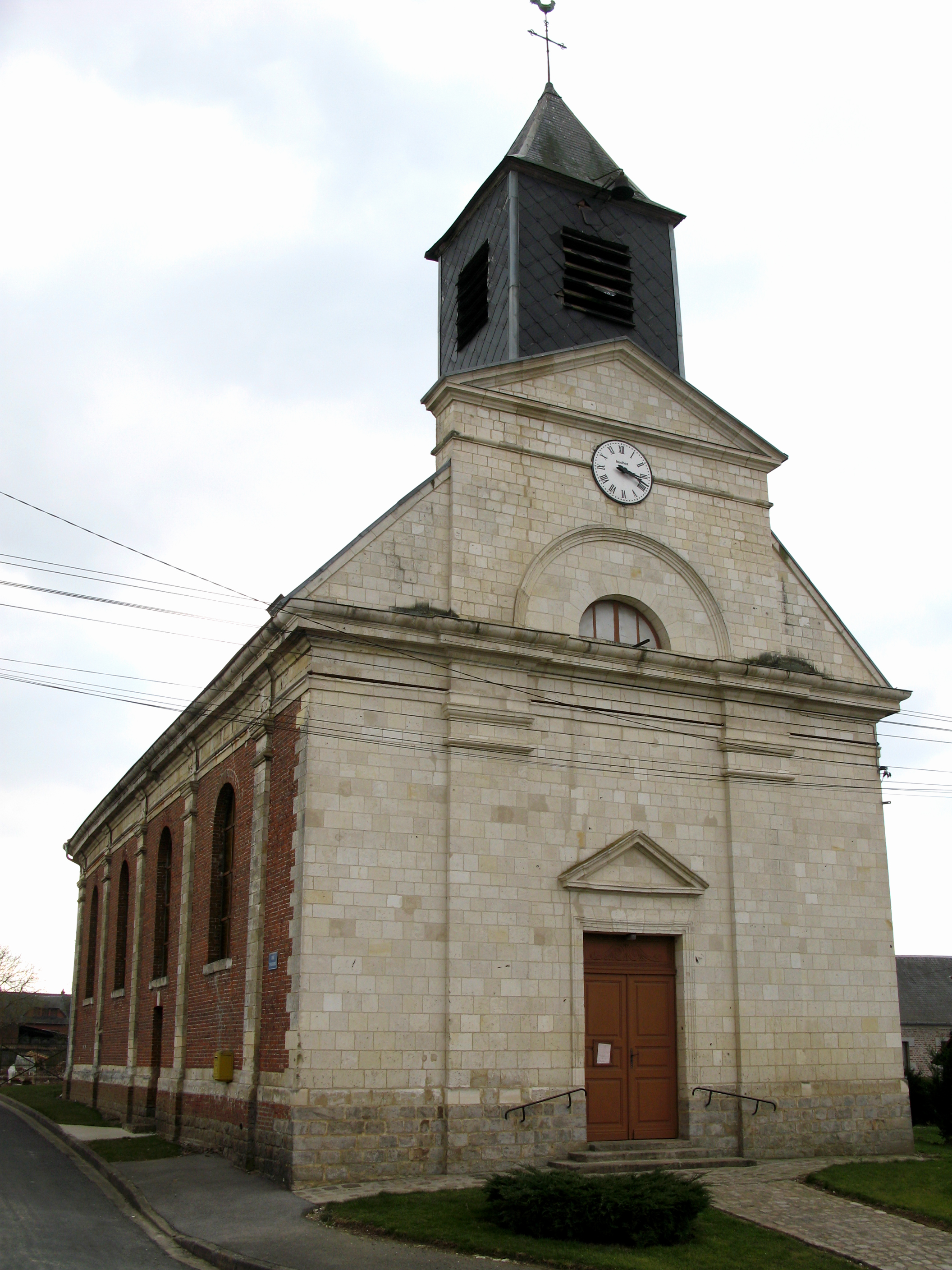 Bertrancourt (Somme, France) - L'église Sainte-Marguerite .